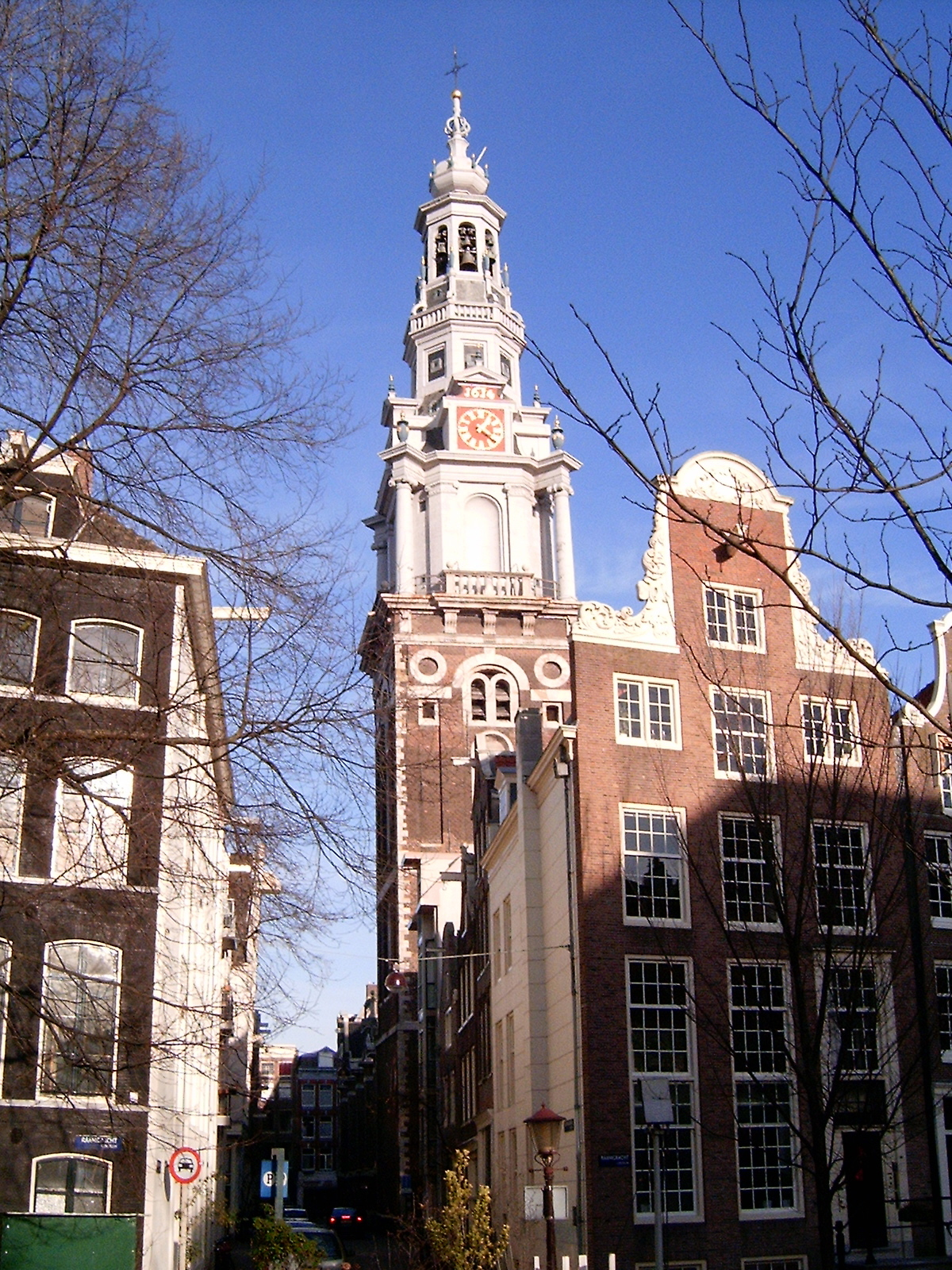 Zuider Church of Amsterdam